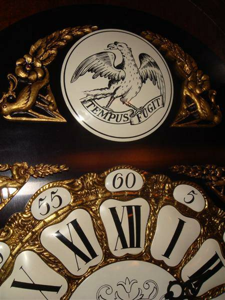 Mostrador de um relógio Foto de Jose Goncalves